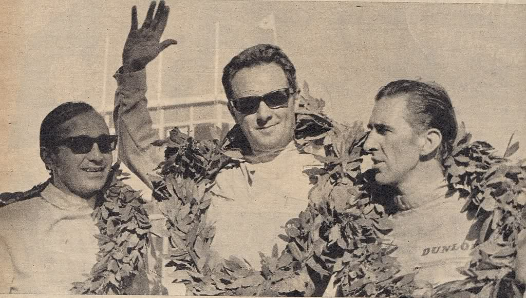 Podio de la primera fecha de la temporada 1968 de TC, en el Autódromo de Buenos Aires. 1°: Eduardo Copello, 2° Nasif Estéfano y 3° Gastón Perkins.